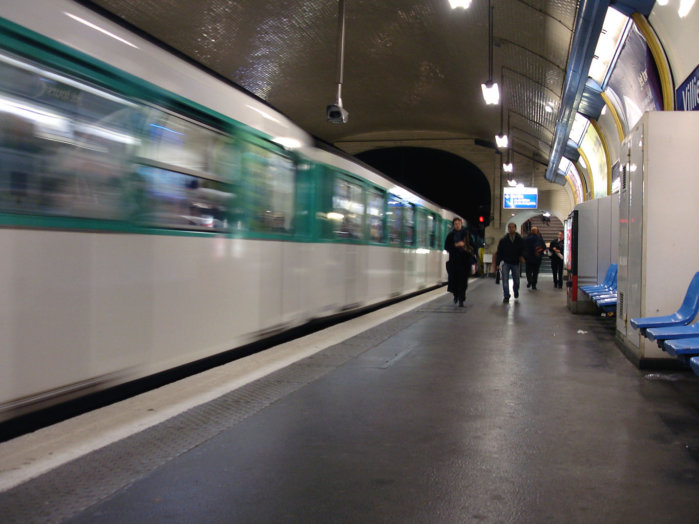 Station Villiers, de la ligne 3 du métro de Paris, France.